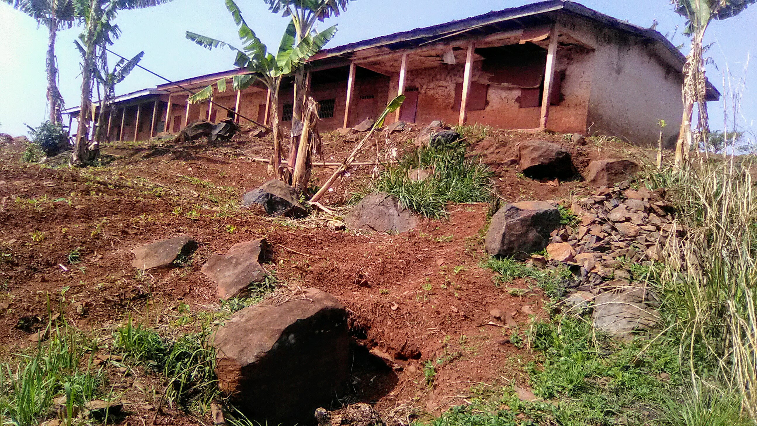 Un bâtiment de plusieurs salles de classes construit sur des blocs de pierres